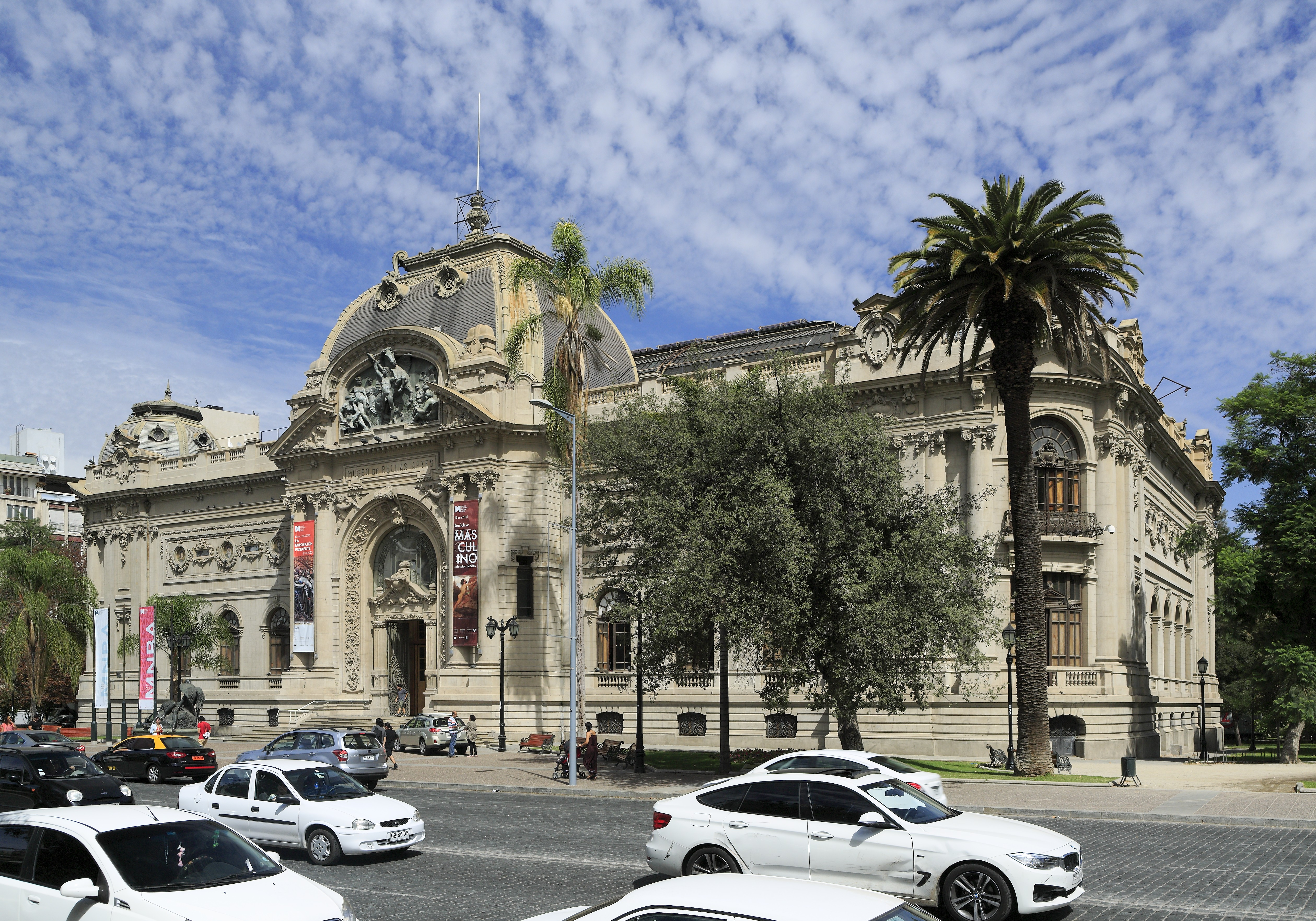 Museum der schönen Künste, an der Calle José Miguel de la Barra im Parque Forestal am Südufer des Río Mapocho